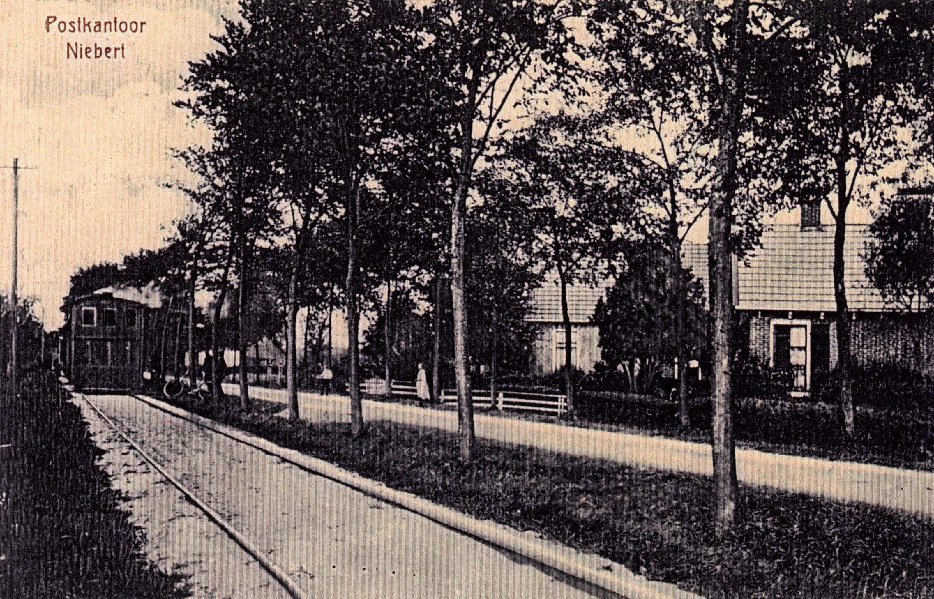 De tram van de Tramlijn Drachten - Groningen in Niebert, nabij het postkantoor.